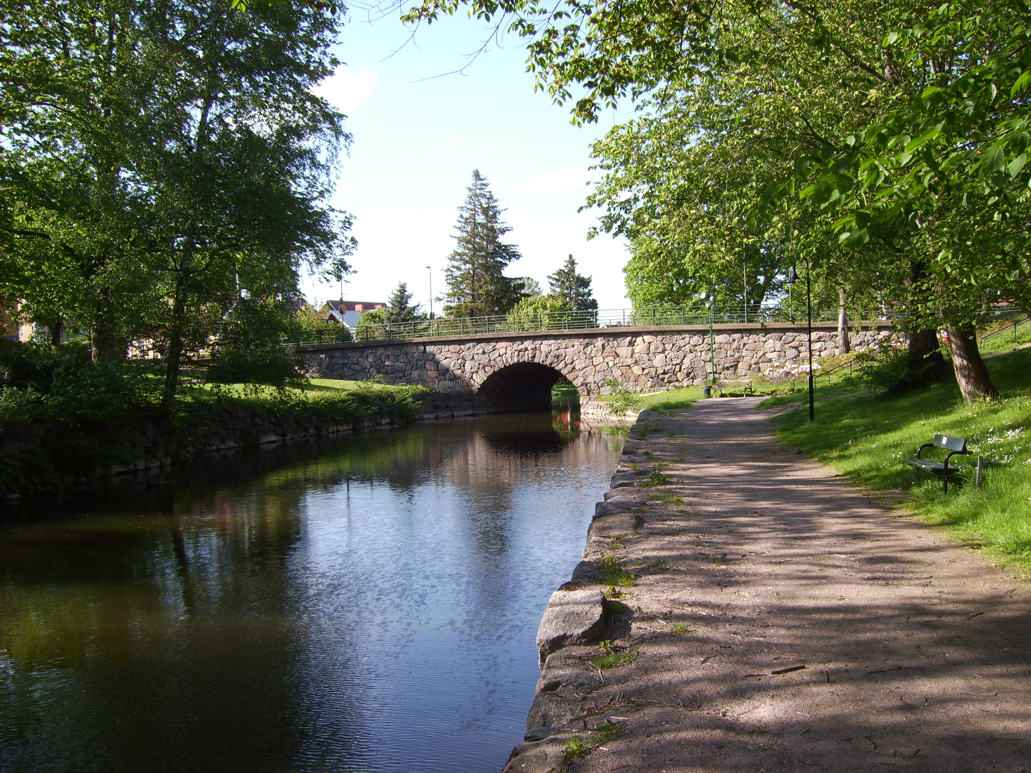 Skänninge